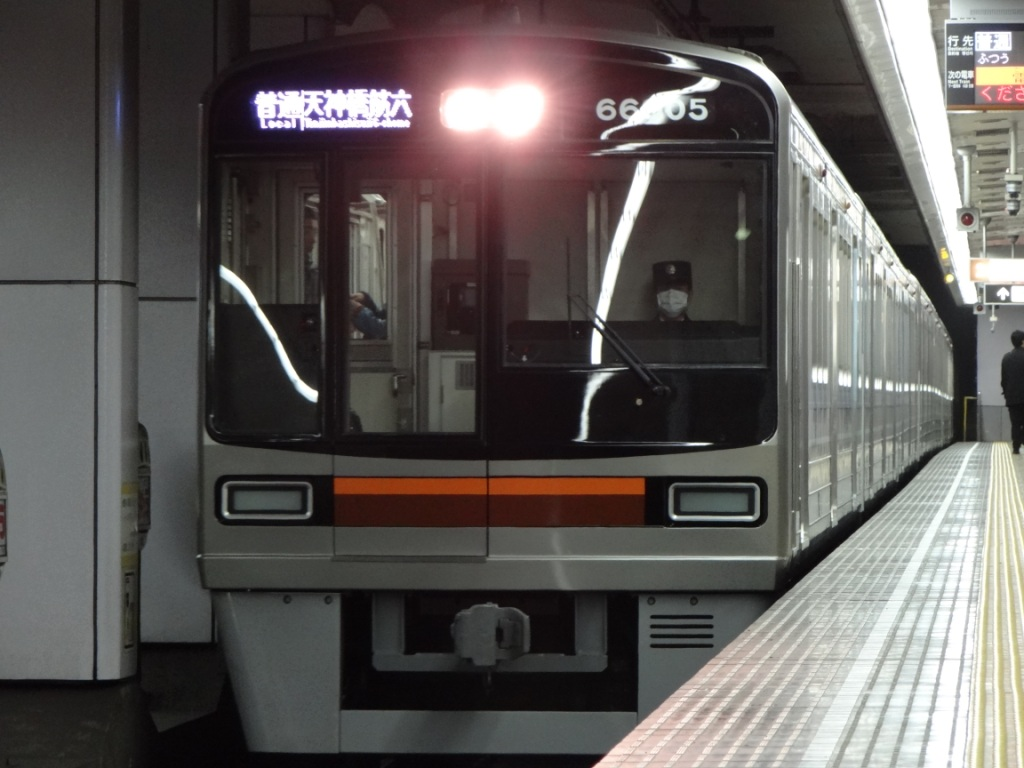 運用に復帰した66系改造車。